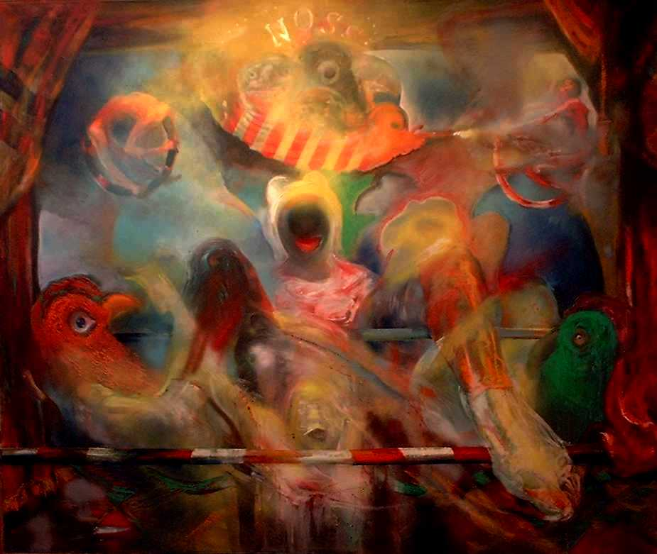 Nosotros los Monos - Mural Expuesto en el Museo de Amparo de Puebla en México